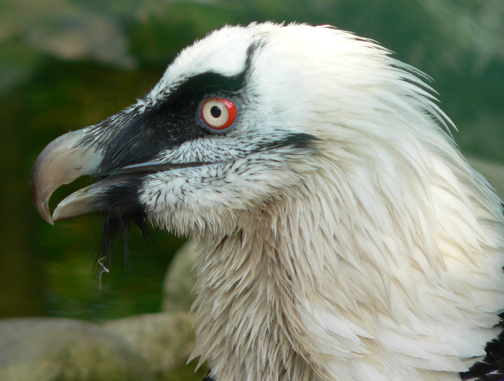 Gypaetus barbatus Mai 2005 Benutzer:Else2